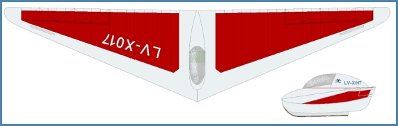 Horten 1b